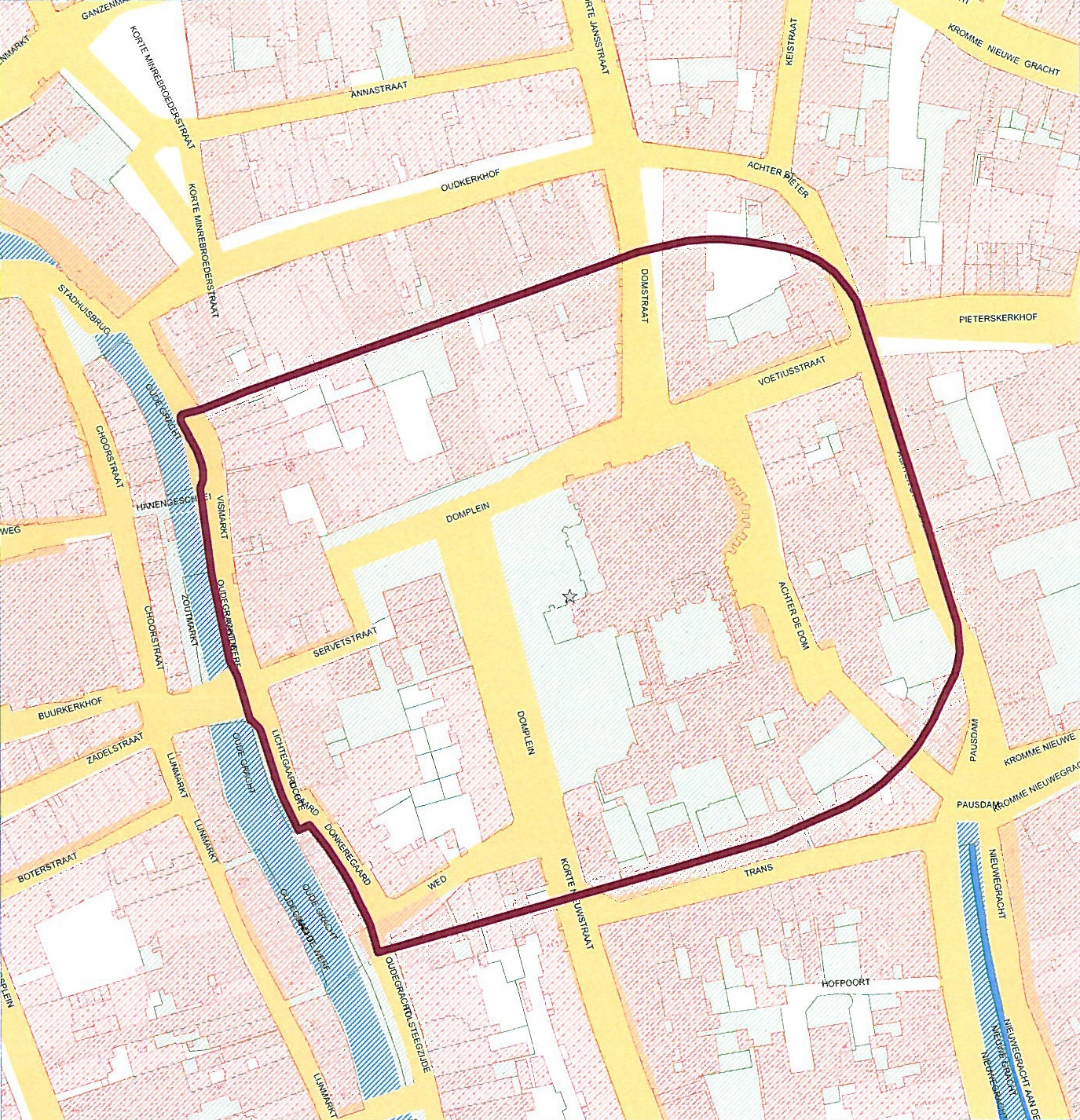 Begrenzingskaart met het Romeinse castellum Traiectum/Trecht in de Utrechtse binnenstad (Domplein en omgeving)